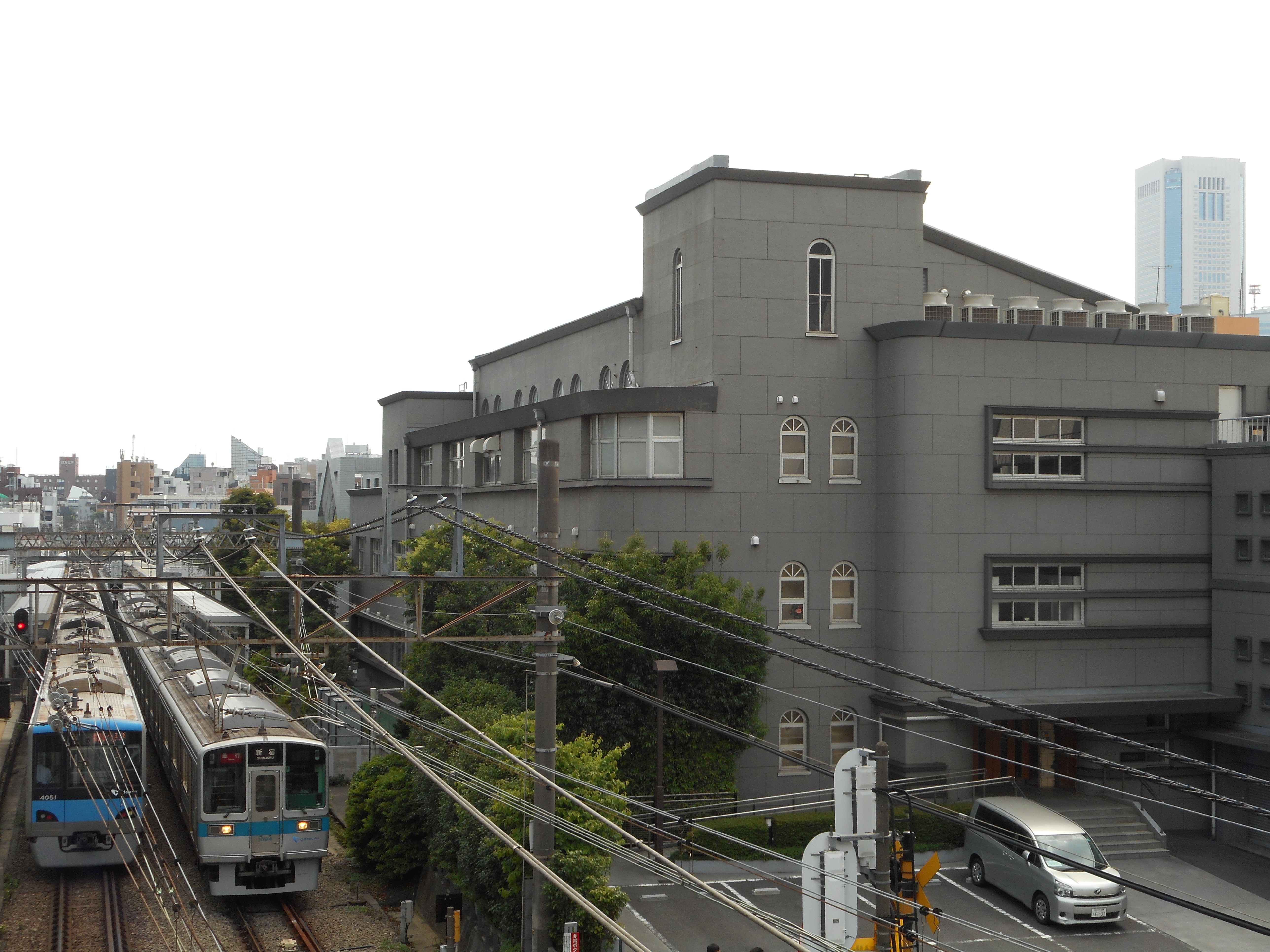 渡辺仁による設計の小田急旧本社社屋